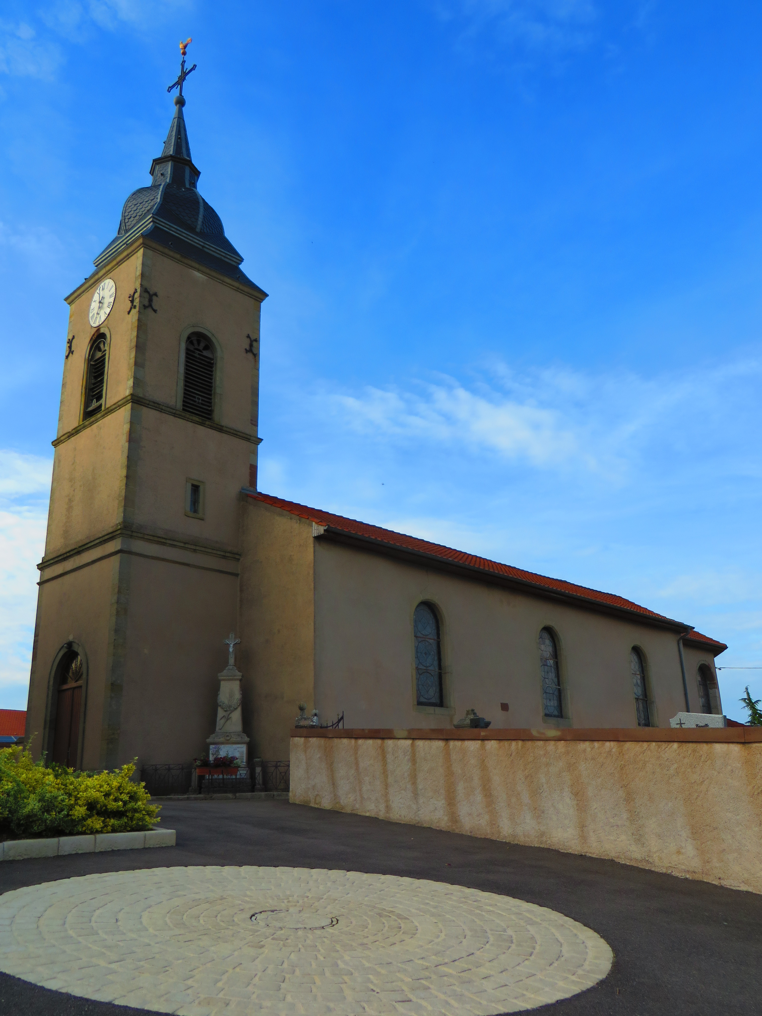 Azoudange eglise